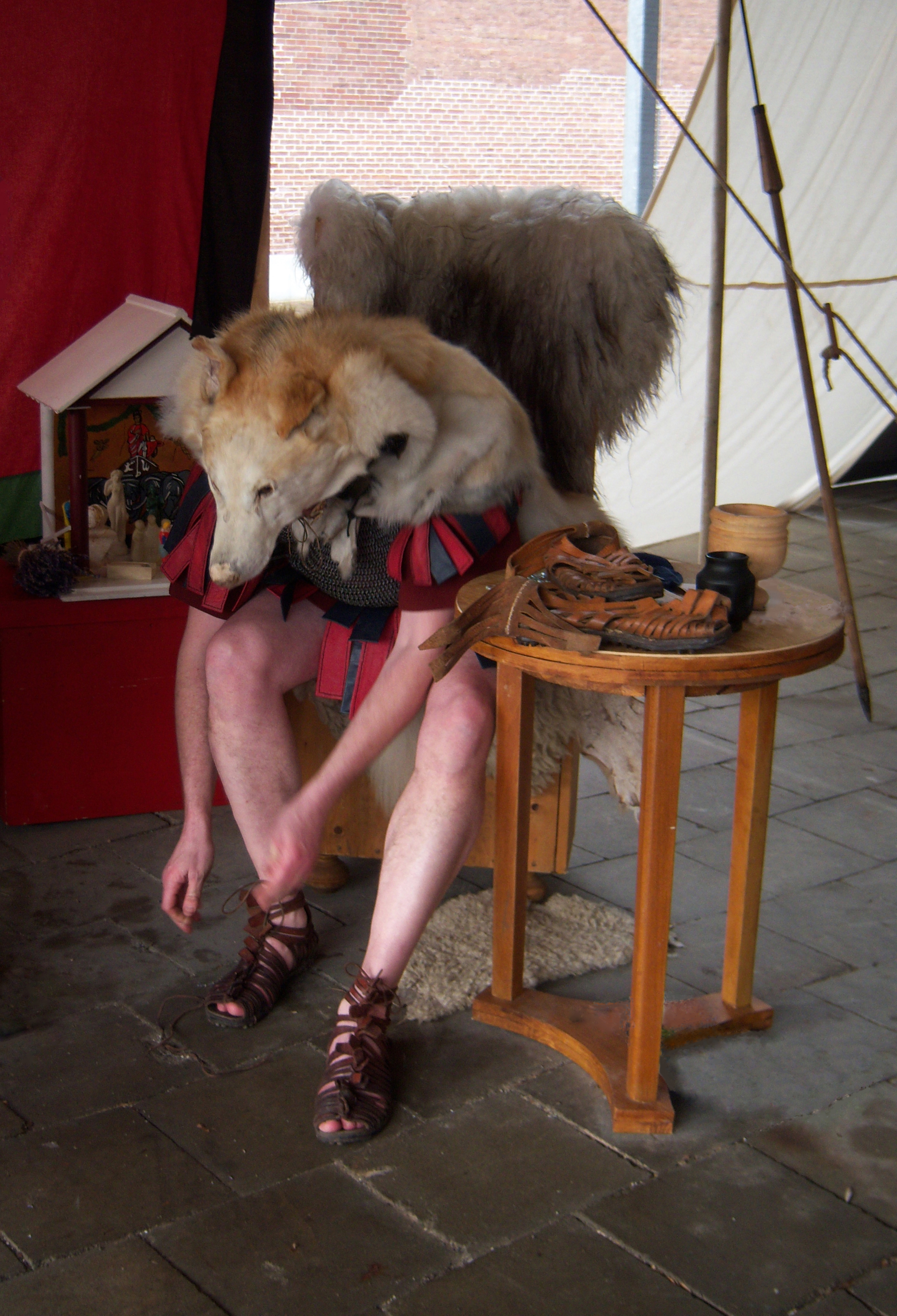 Romeinse legionair (vaandeldrager met wolvenvel) trekt zijn caligae aan. Een caliga is een stevige sandaal. De zool is versterkt met kopspijkers. Locatie: Fort Wierickerschans, Bodegraven 2009.